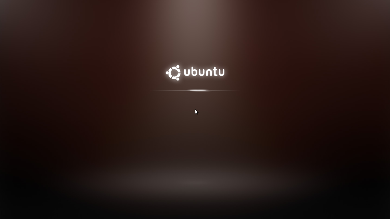 Ubuntu 9.10 (Karmic Koala) startup, liveUSB